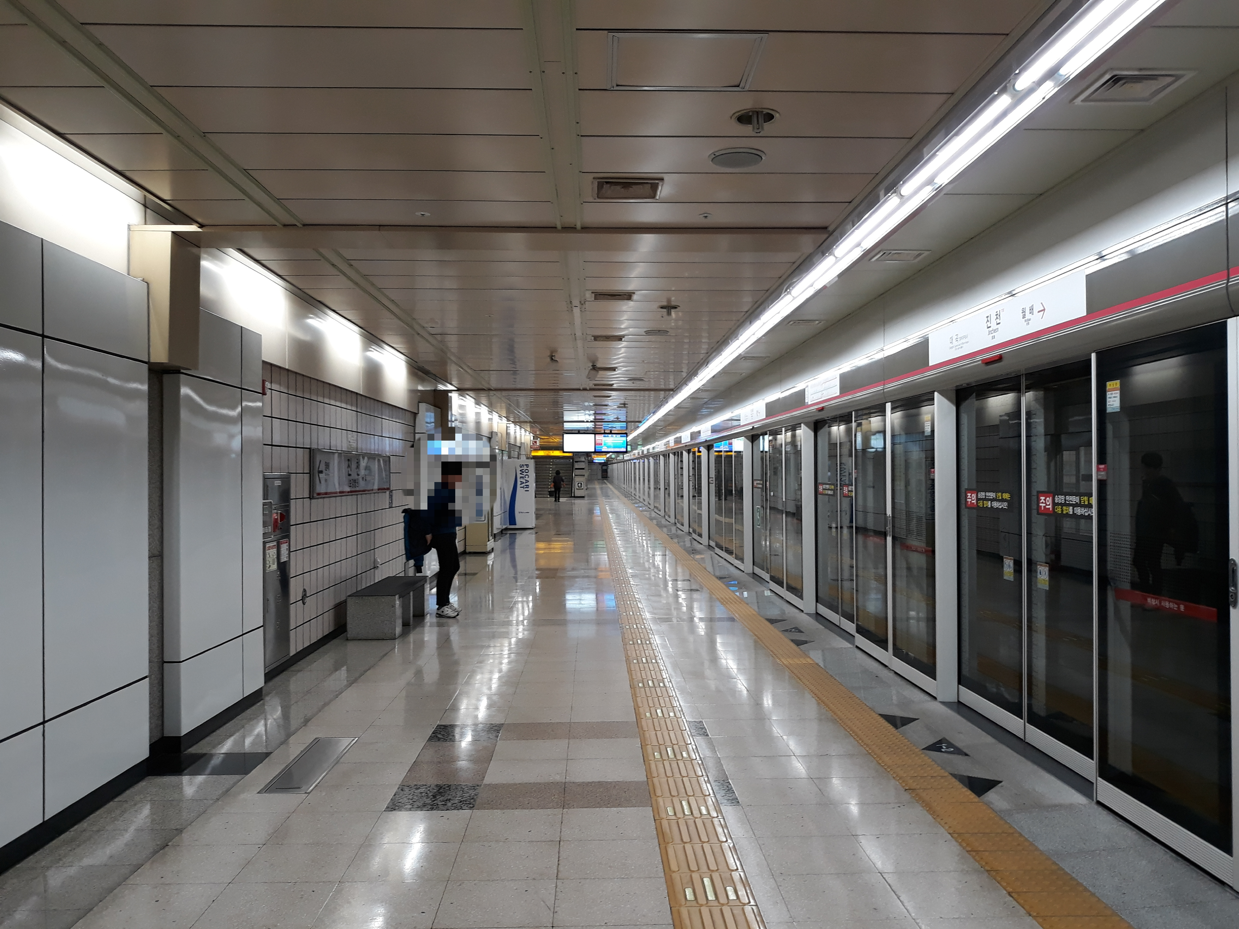 대구 도시철도 1호선 진천역 안심 방면 승강장